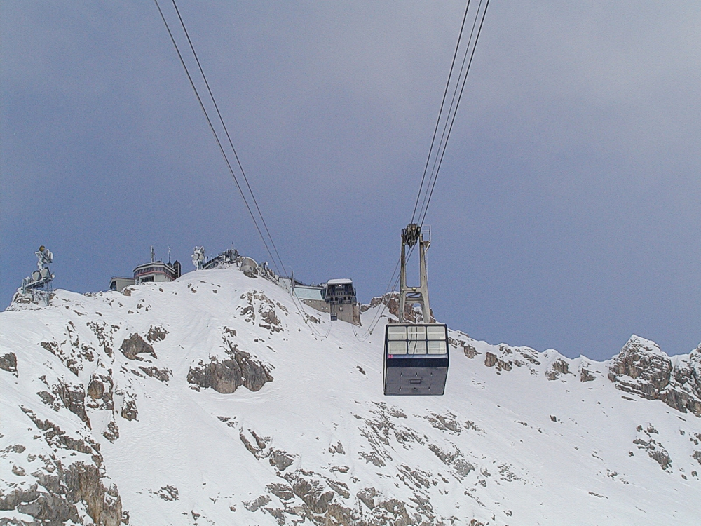 Bilder von der Zugspitze: Gletscherbahn zum Gipfel